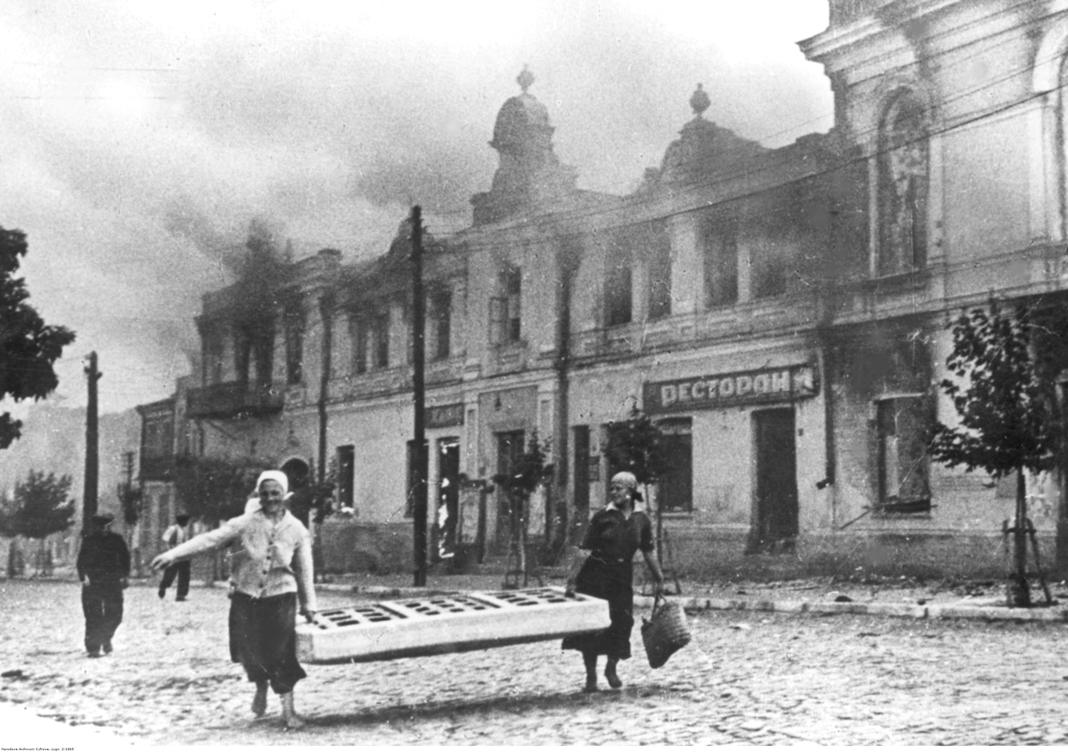 Biała Cerkiew. Pożar miasta. Widoczna ludność cywilna ratująca swój dobytek.